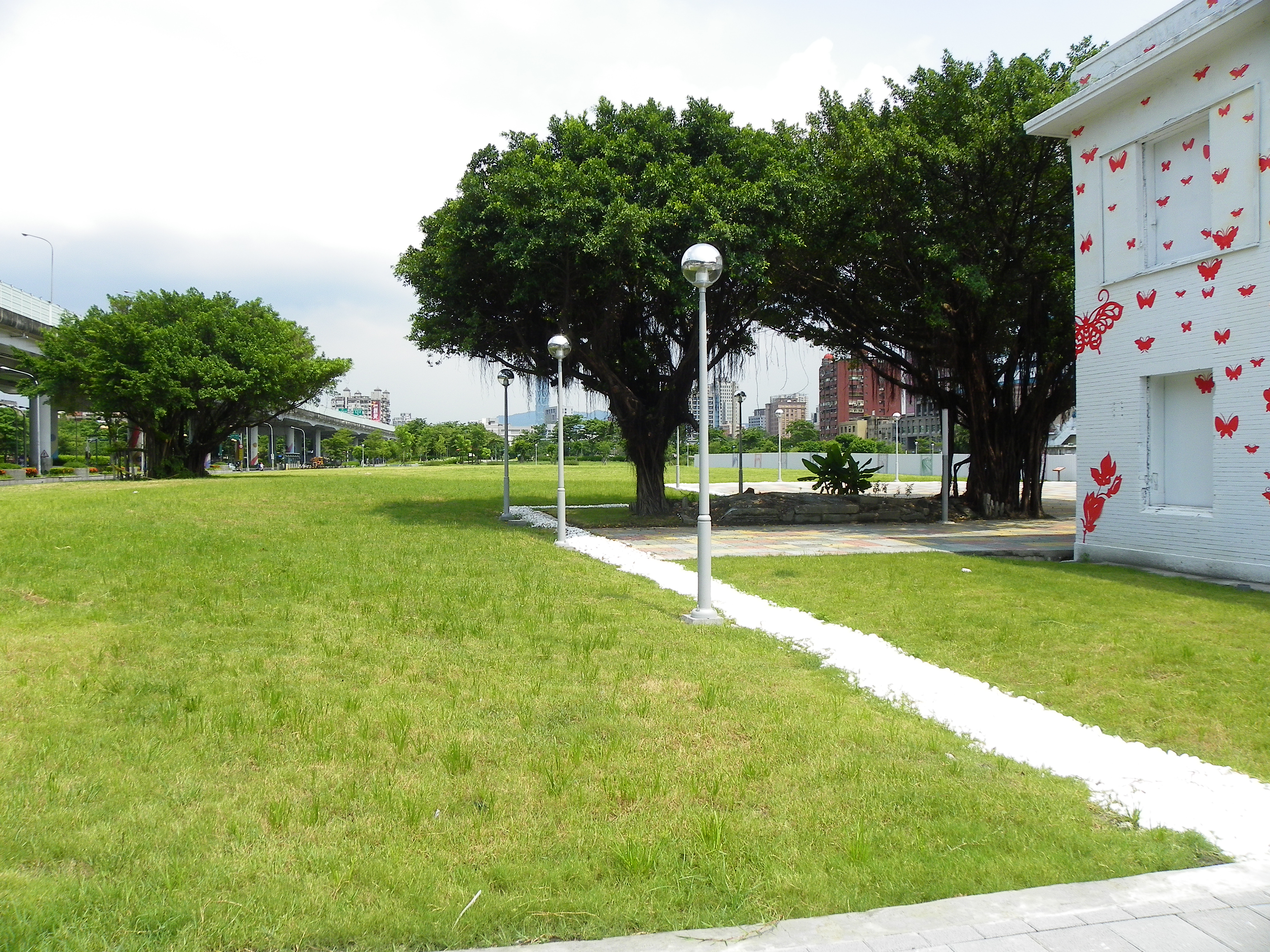 2010年8月，自原華山車站站舍北側東望整地綠化後的車站遺址。